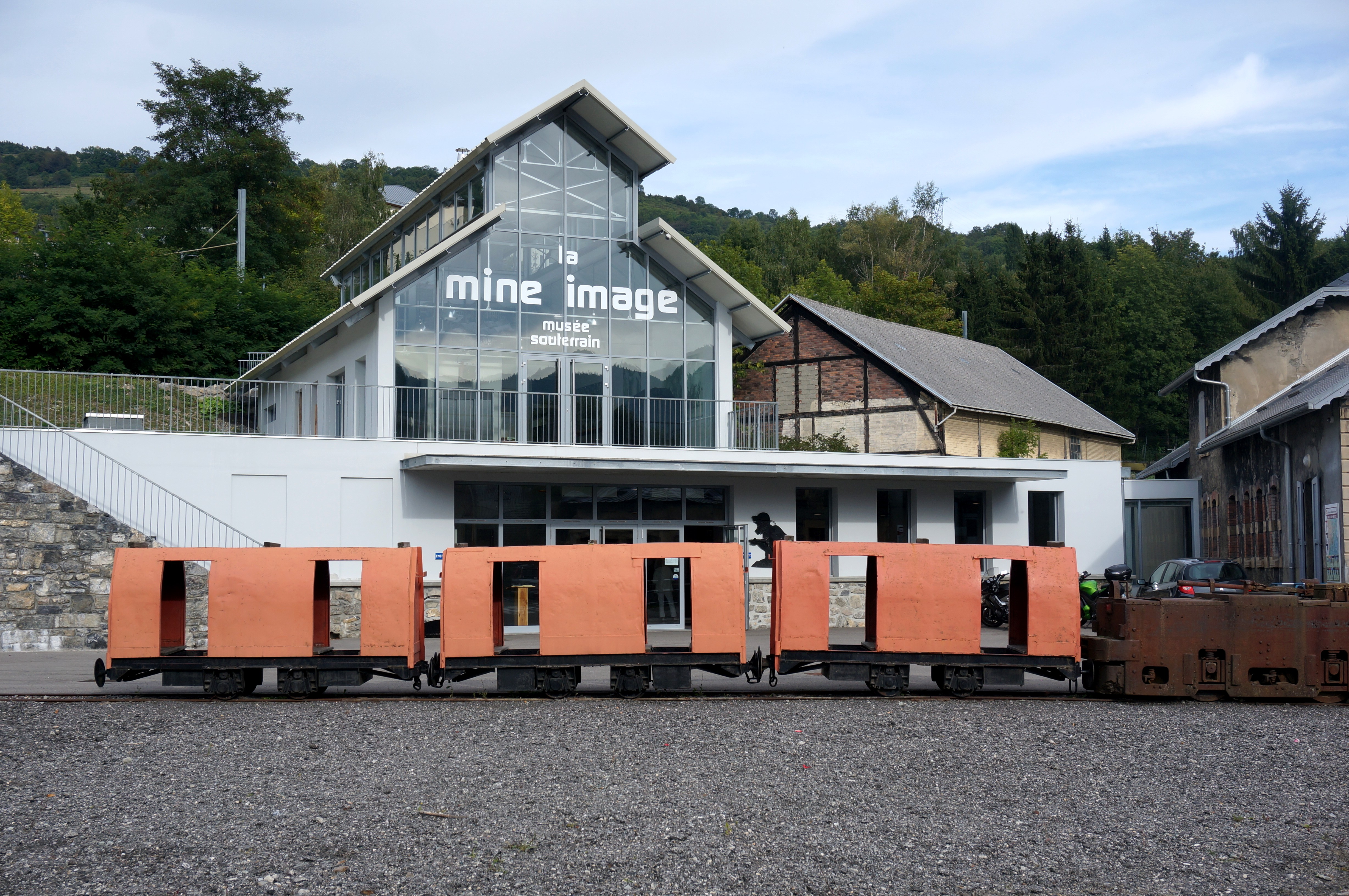 Le musée "La Mine Image" à La Motte-d'Aveillans (Isère)